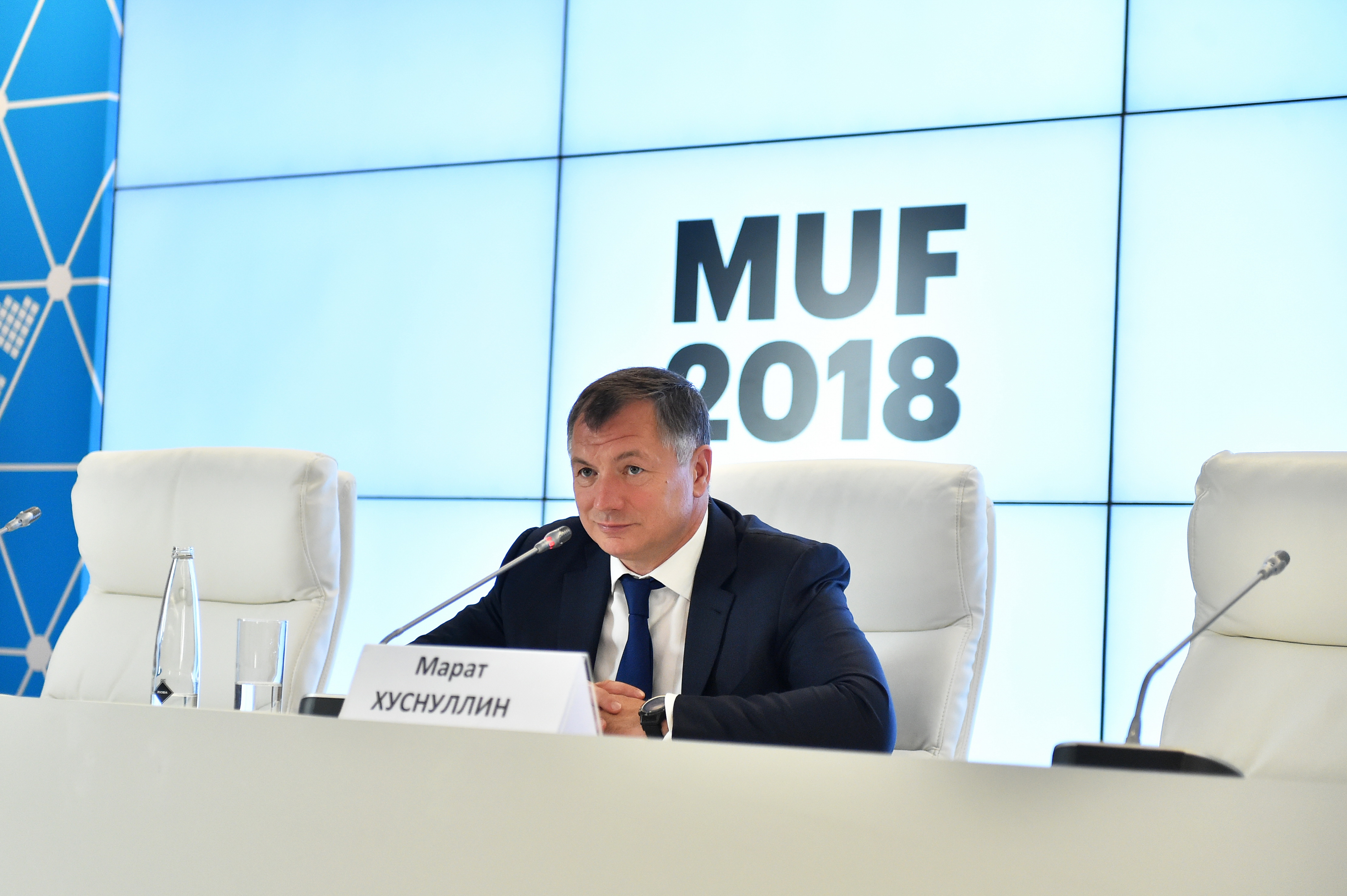 Марат Хуснуллин на 8-м Московском урбанистическом форуме 17 июля 2018 года